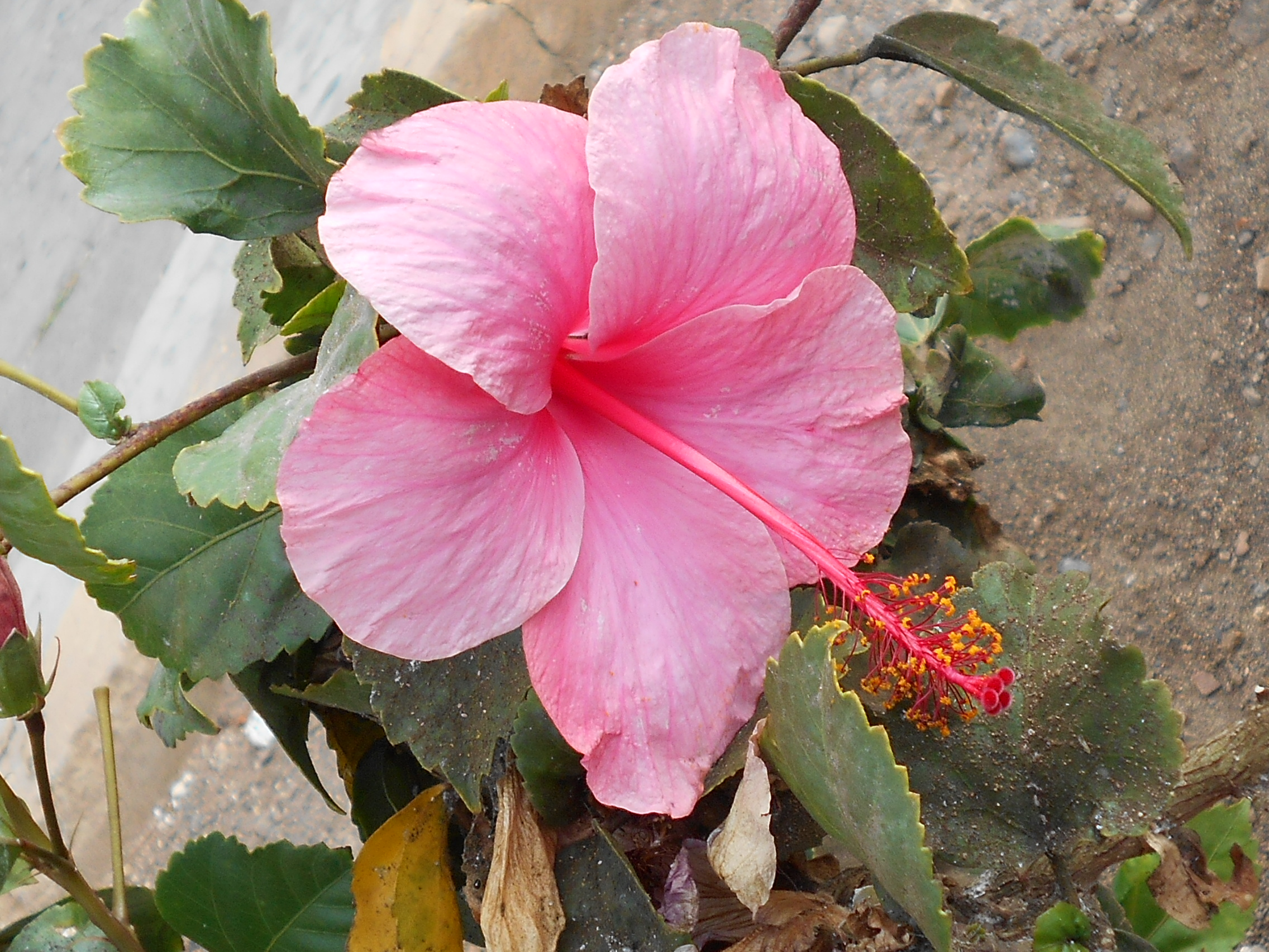 Hibiscus rosa-sinensis fotografato da vicino in un giardino publico.Si notino vari pistilli e stami.